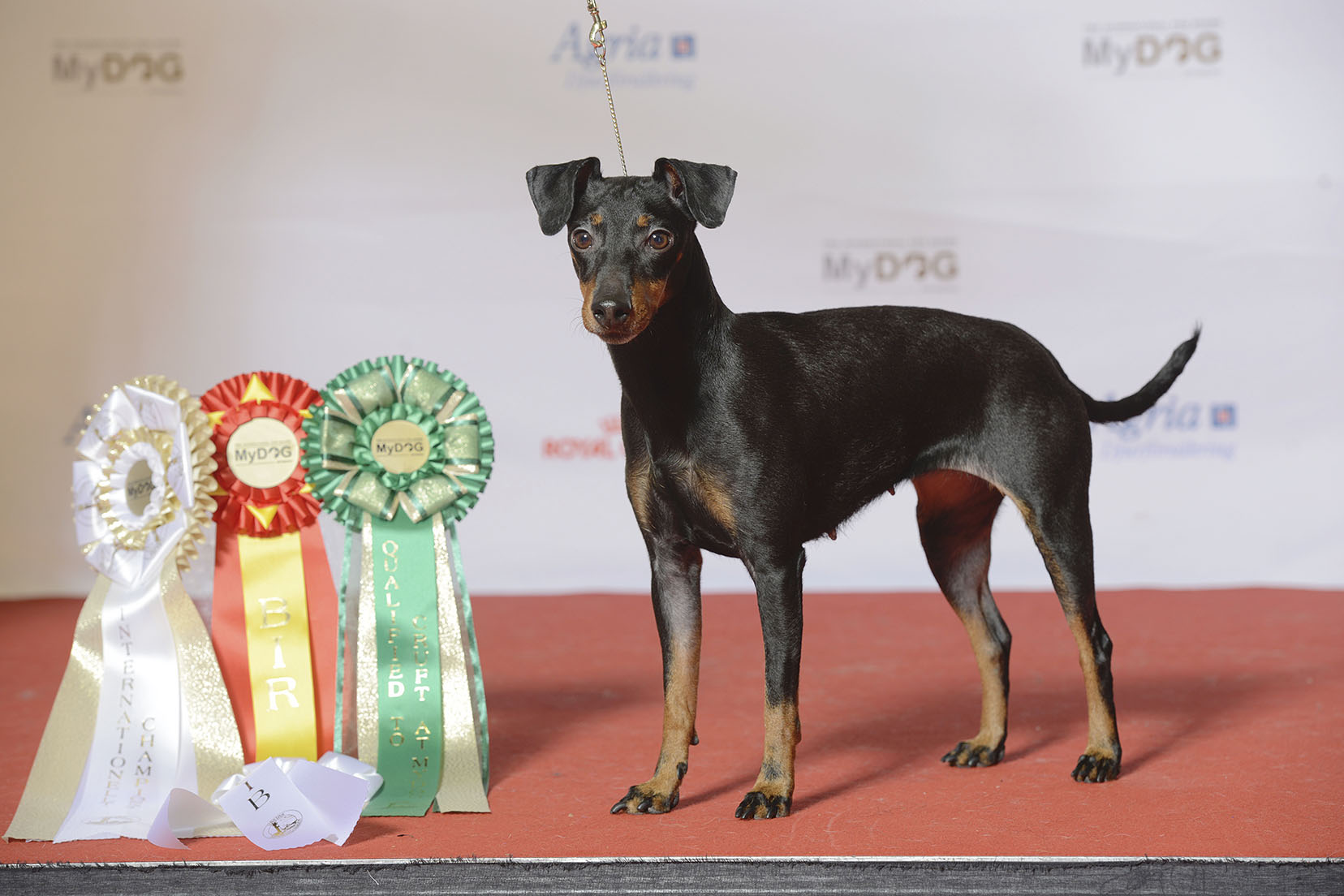 Grupp 3, MANCHESTERTERRIER, NORD UCH Tsar-Ping’s roller Coaster Sigyn MyDOG, nordens största hundevenemang.